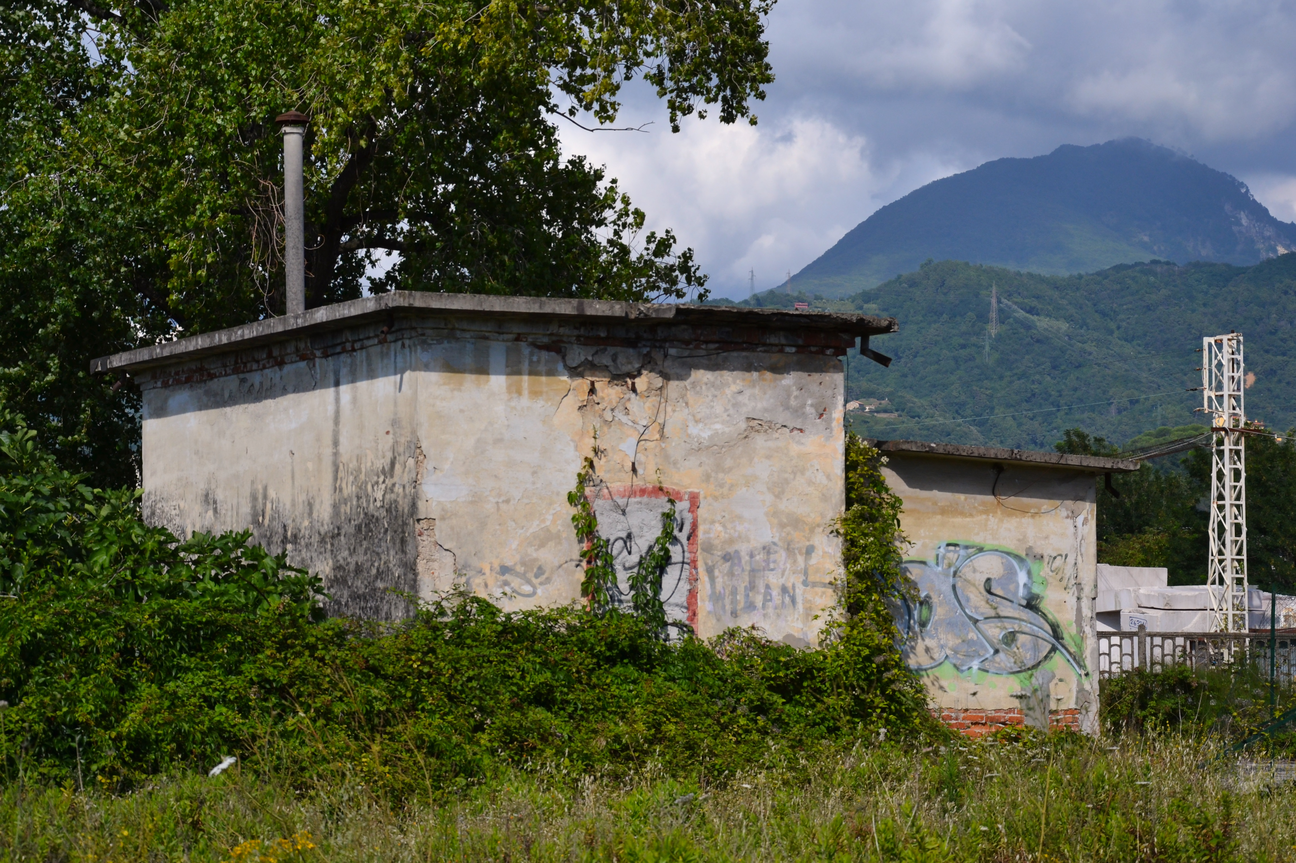 Veduta dell'ex magazzino, posto davanti l'ufficio del capostazione. Era collegato fino al 2005 da un attraversamento a raso con la 2ª banchina passeggeri banchina.